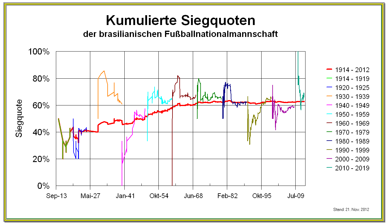 Kumulierte Siegquote der Brasilianischen Nationalmannschaft